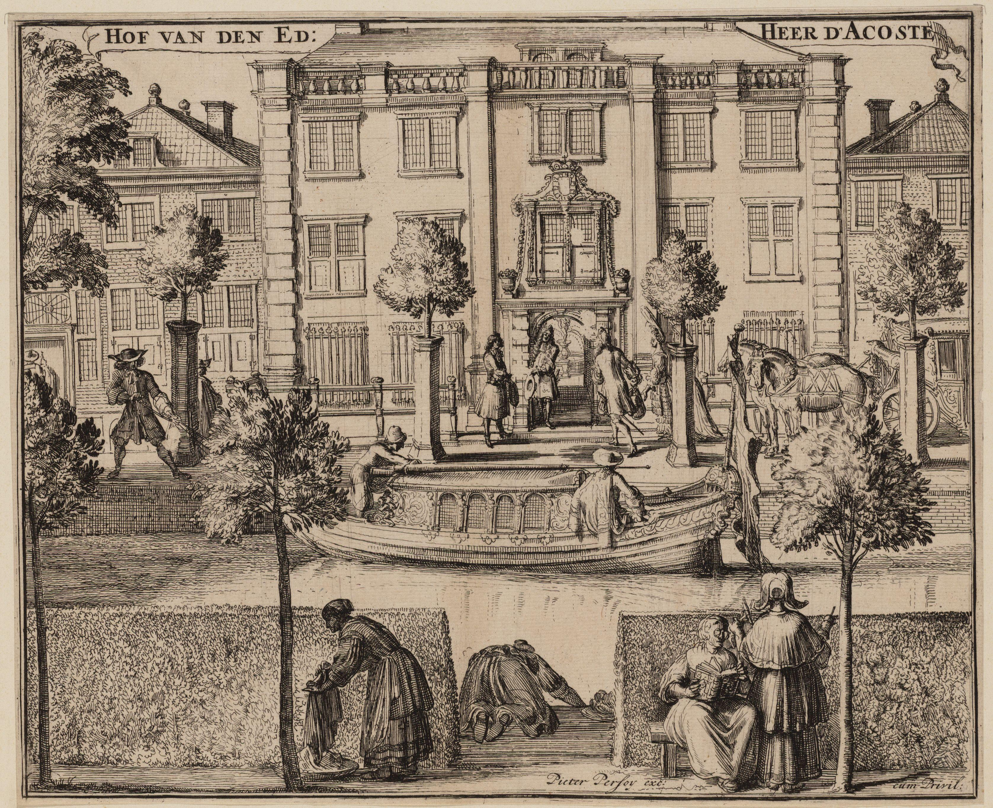 Beschrijving Hof van den Ed: Heer d'Acoste Gezicht op het huis van de heer d'Acoste, Nieuwe Herengracht 49. Op de voorgrond twee vrouwen die de was doen en een lezende en een spinnende vrouw. In de gracht een speeljacht. Afmetingen: 225 x 270 mm Documenttype prent Vervaardiger Hooghe, Romeyn de Collectie Collectie Atlas Dreesmann Datering 1686 t/m 1700 ca. Geografische naam Nieuwe Herengracht Inventarissen Afbeeldingsbestand 010094005187